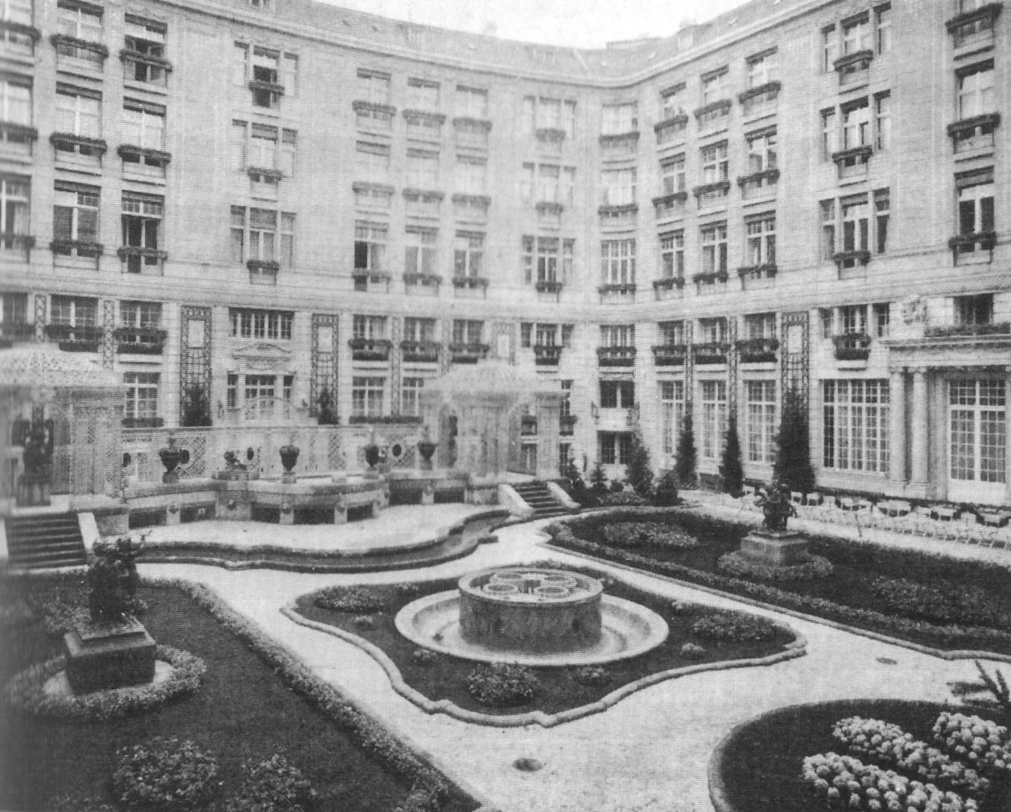 Innenhof des ehemaligen Grand Hotel Esplanade, Berlin, gestaltet von Willi Wendt (* 9. Mai 1854; † nach 1930) etwa zwischen 1907 und 1910.